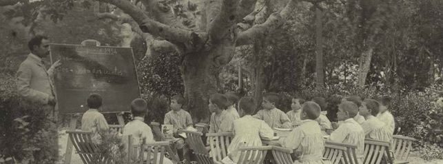 Escuela Bosque, Barcelona c.1914